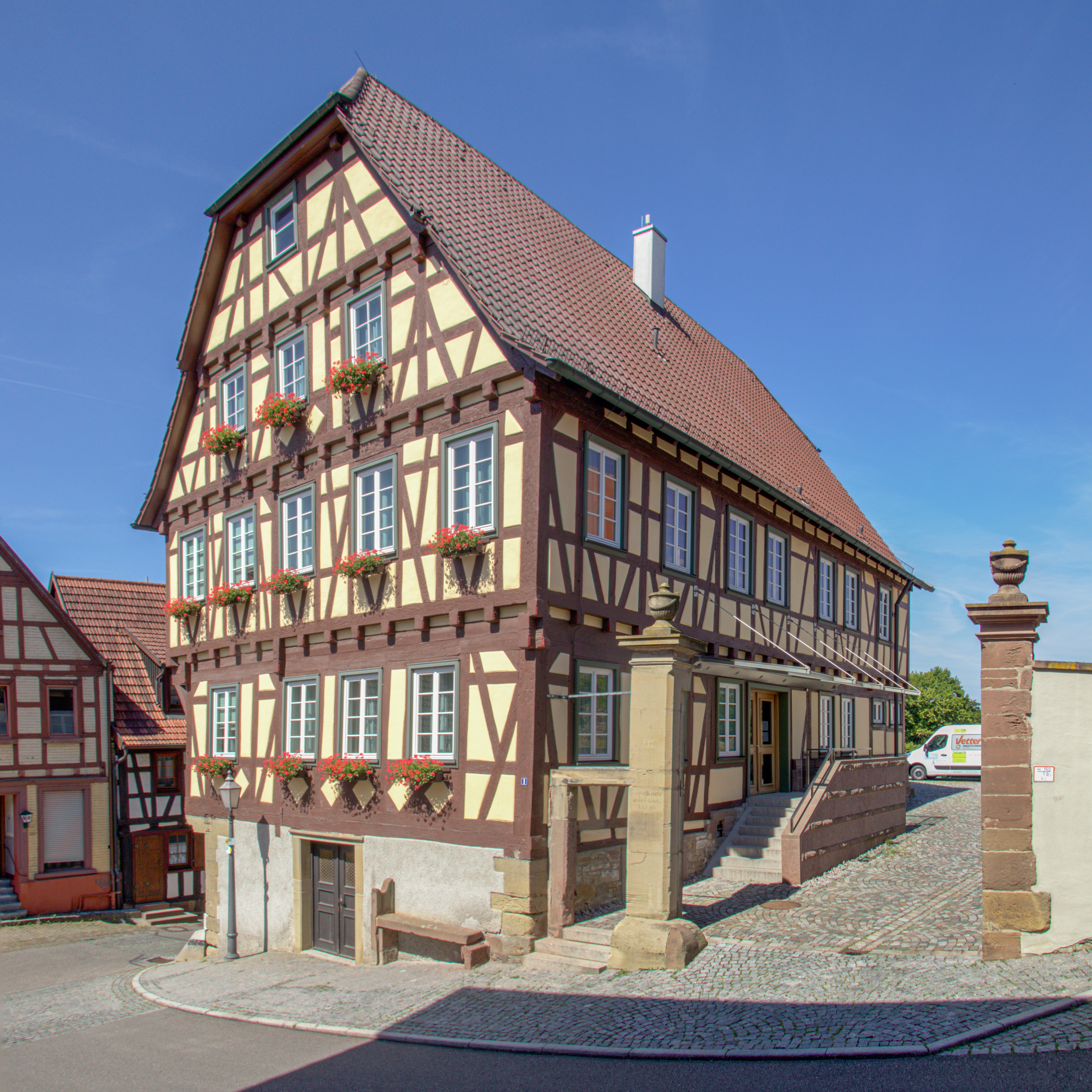 Denkmalgeschützes Fachwerkhaus in Ötisheim - Giebel zur Schöneberger Straße und Traufe zu Hof.